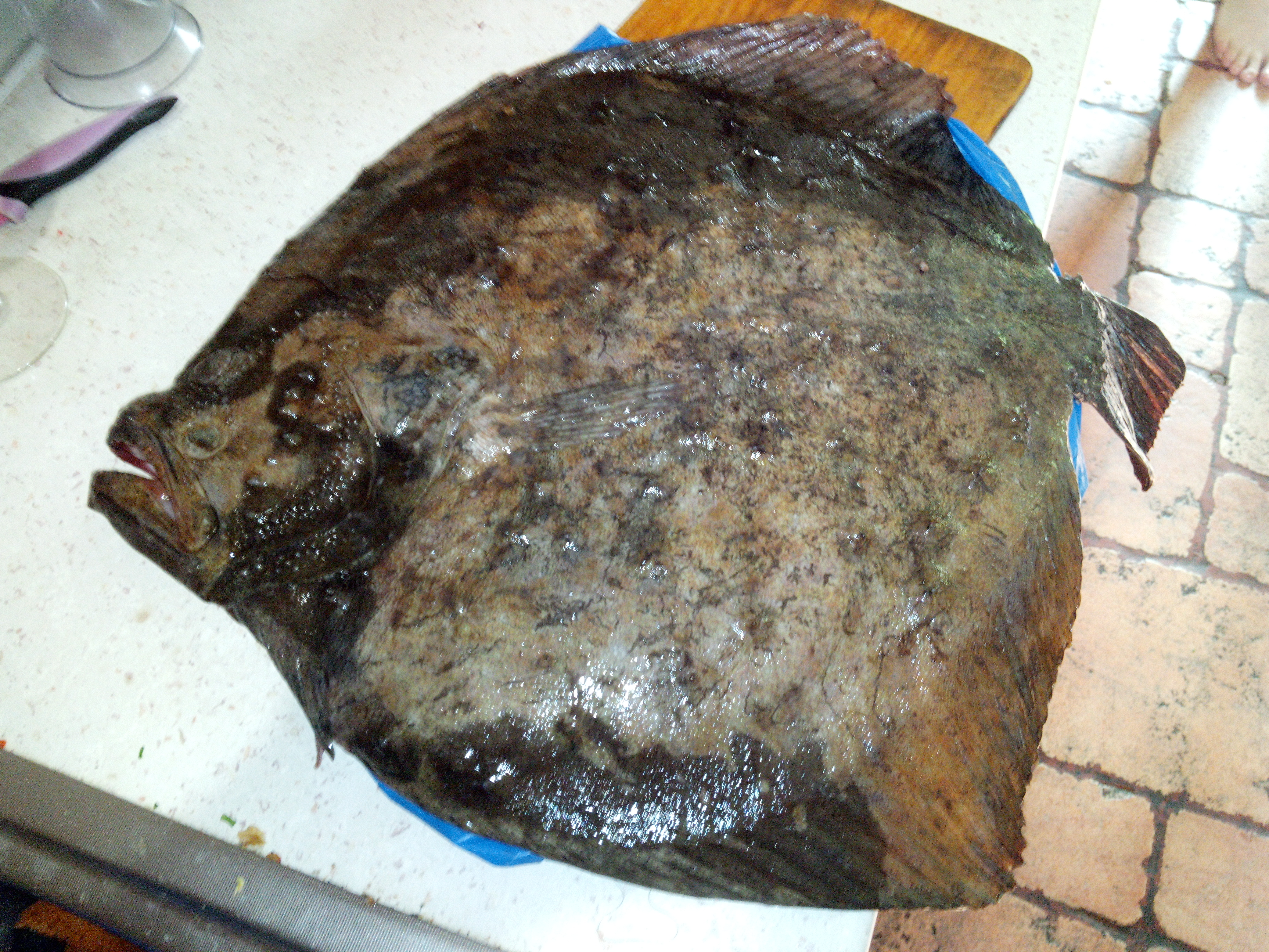 Калкан чорноморський - Очаків